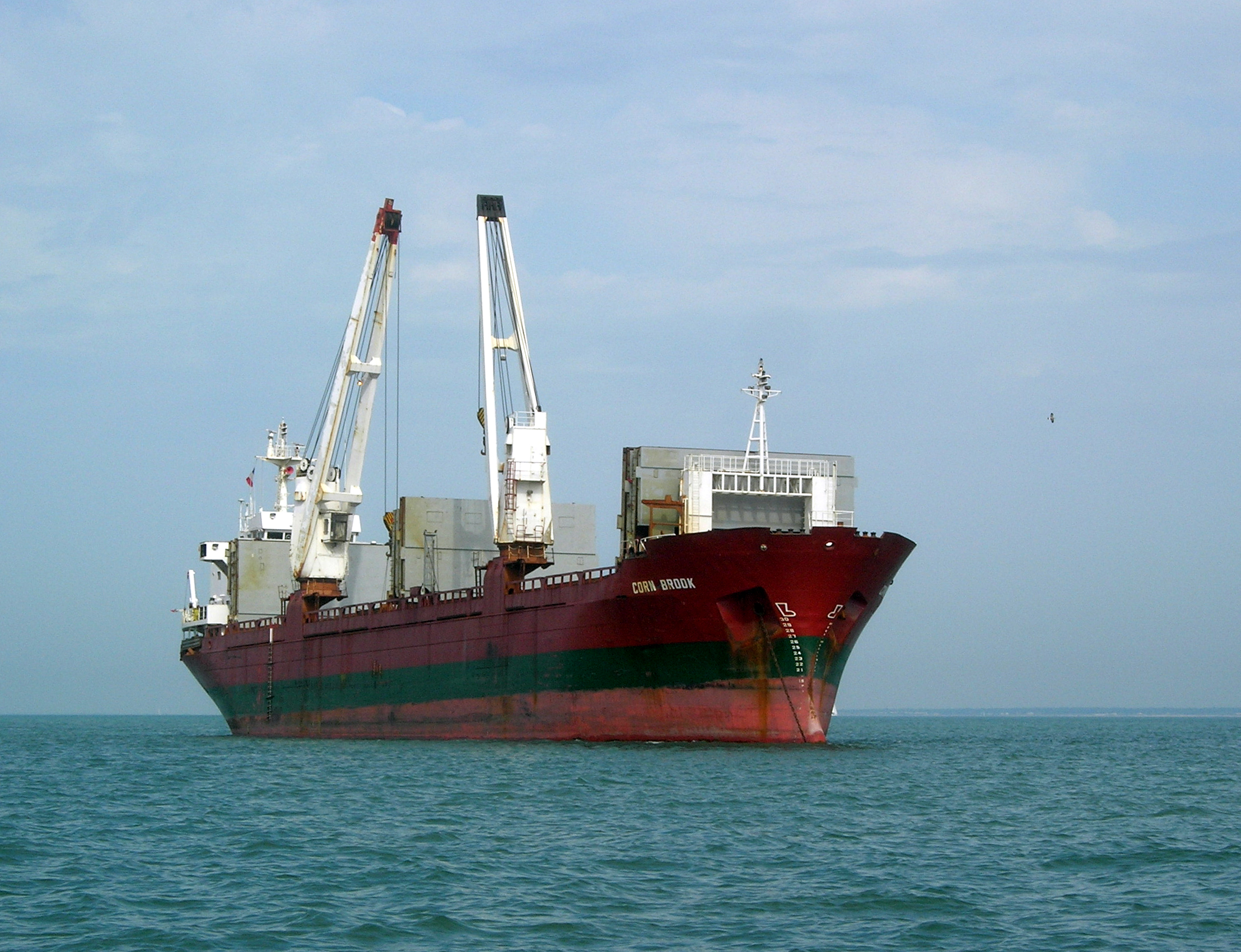 Le Corn Brook, 9HTF7, IMO 8401236, au mouillage au large de La Pallice